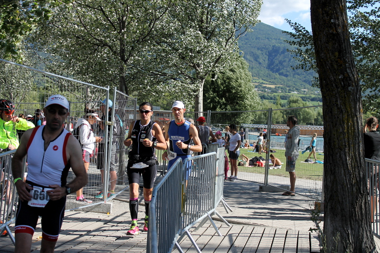 Marathon de l' Embrunman 2014. Une des 50 féminines